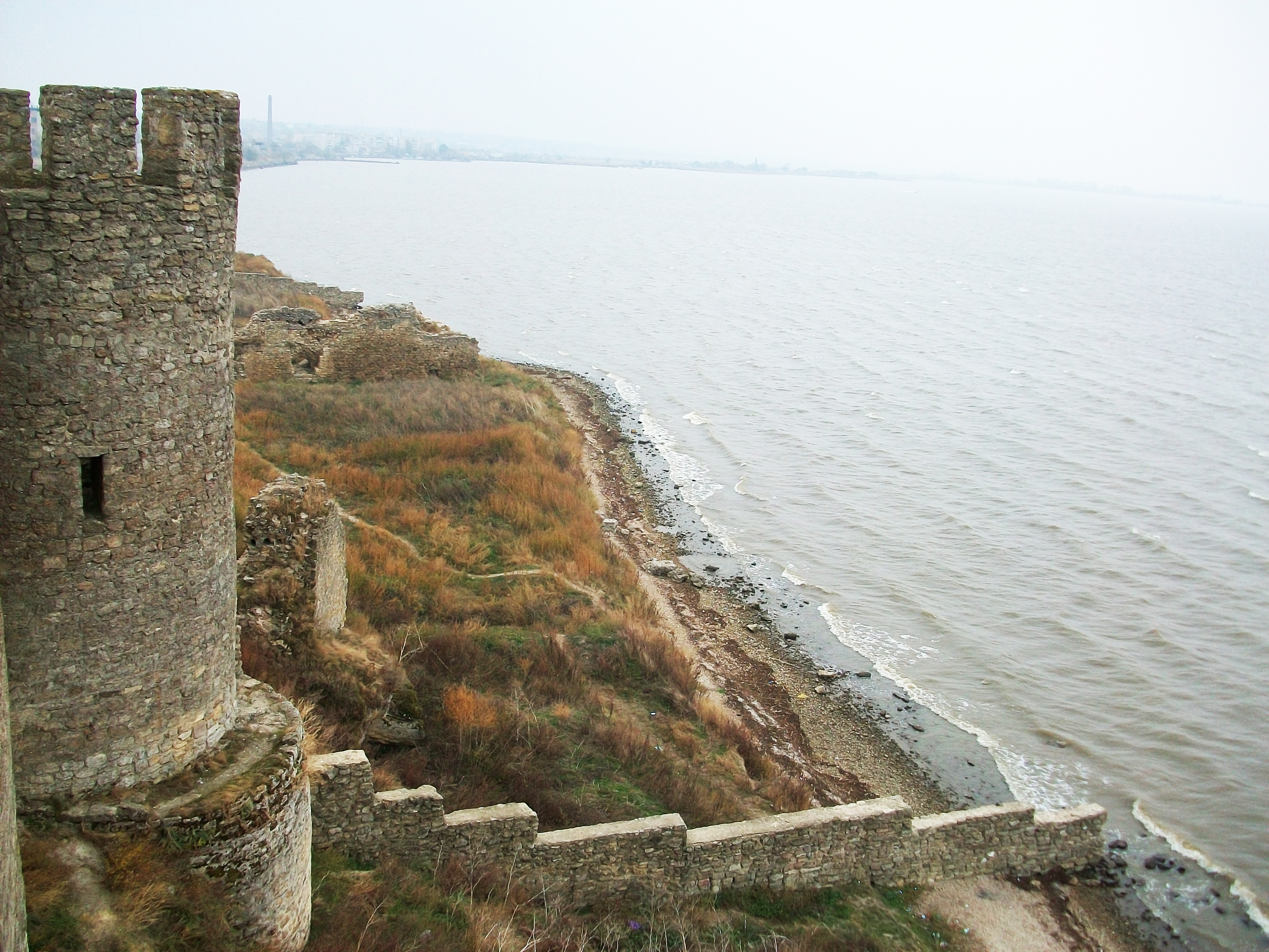 Аккерманська фортеця. Вигляд на лиман